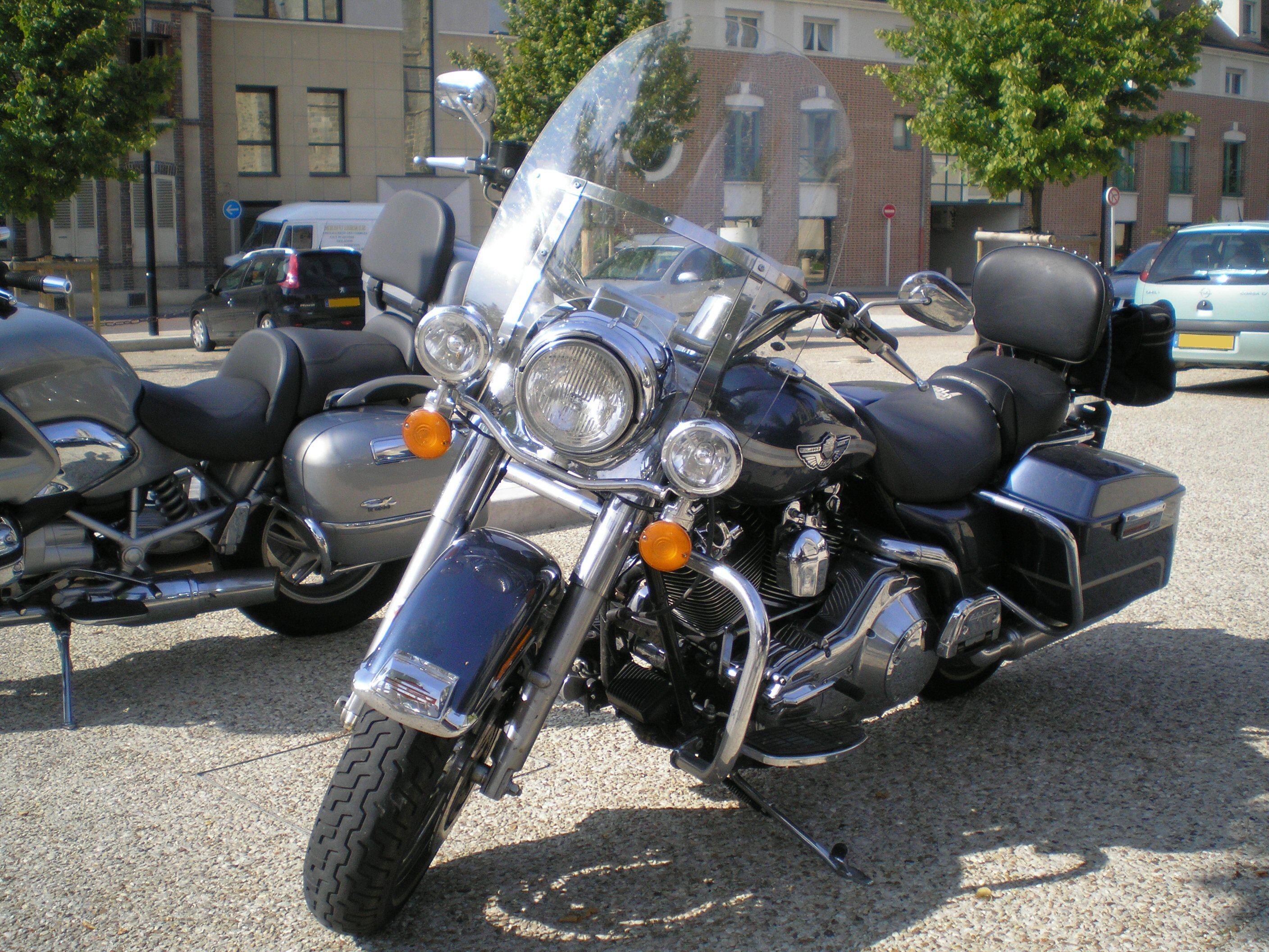 Harley-Davidson 1450 FLHR Road King Auteur : Dédélembrouille